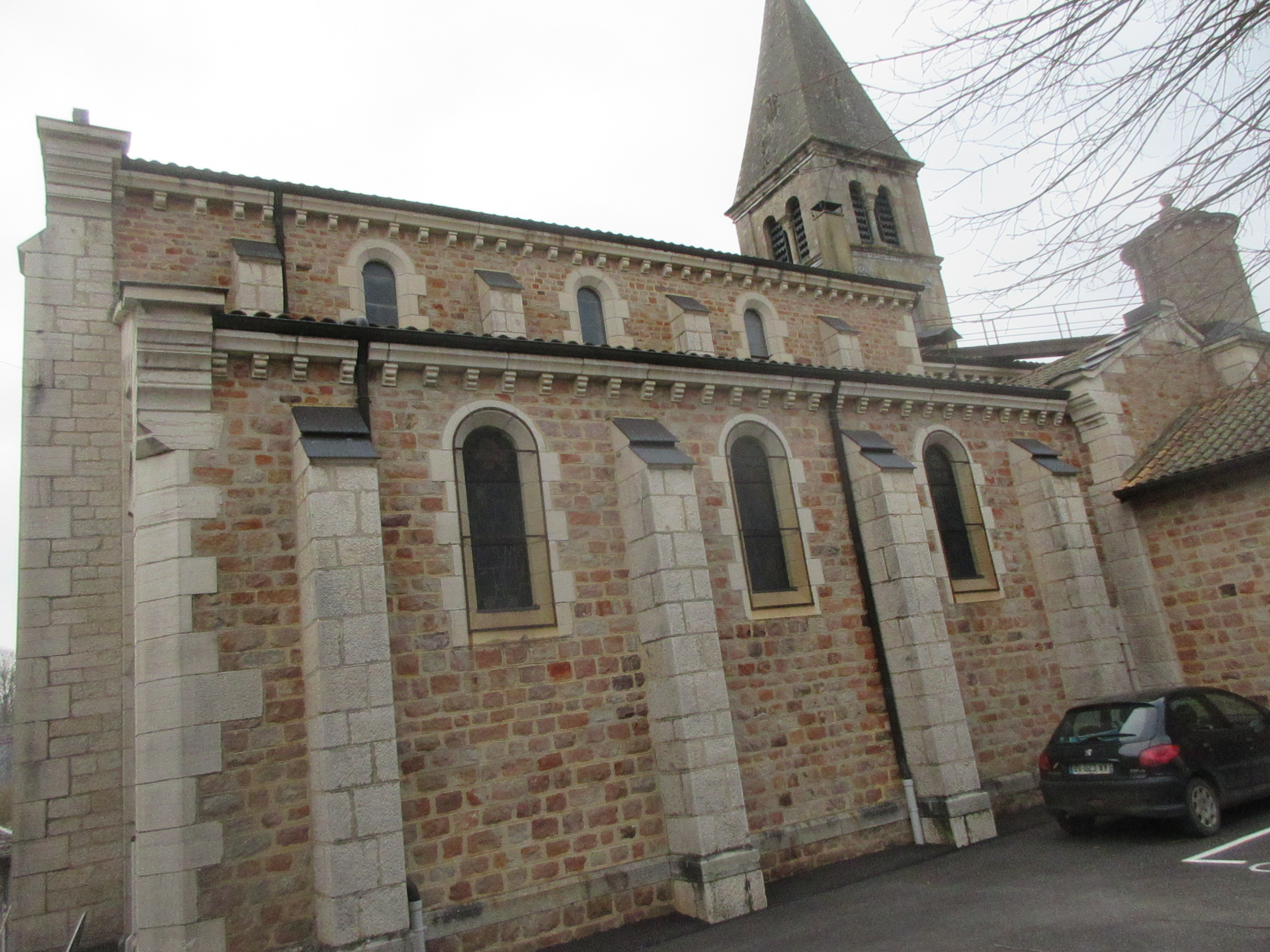 Église Saint-Léger de Saint-Léger-sous-la-Bussière.